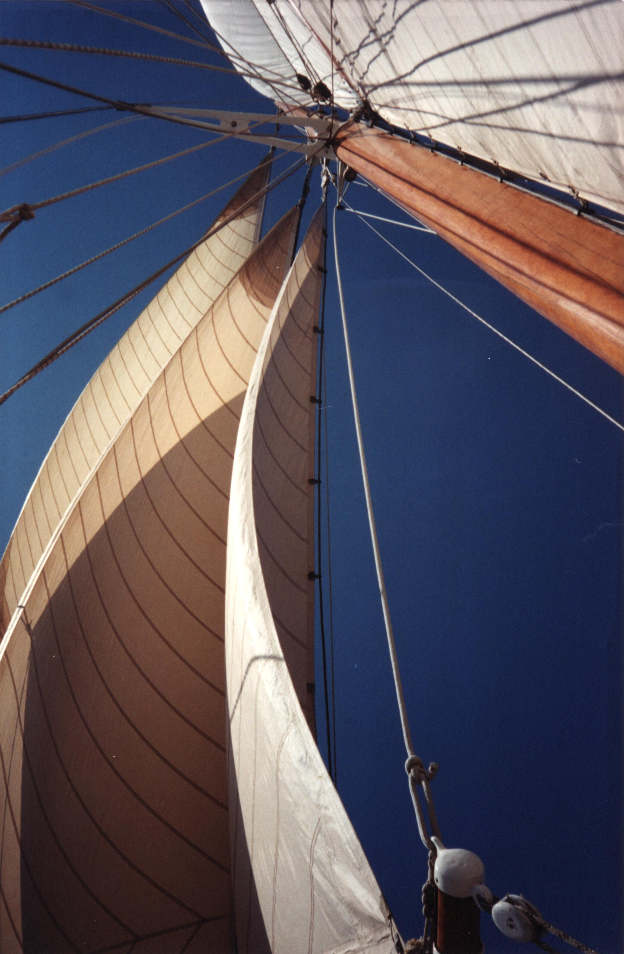 Le navire Hoëdic, ancien thonier breton converti en bateau croisière/promenade au départ du Lavandou, France.